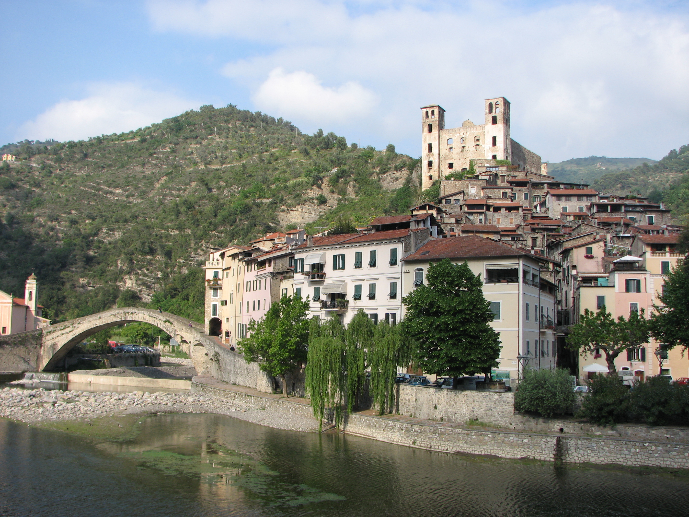 Scorcio del paese vecchio.